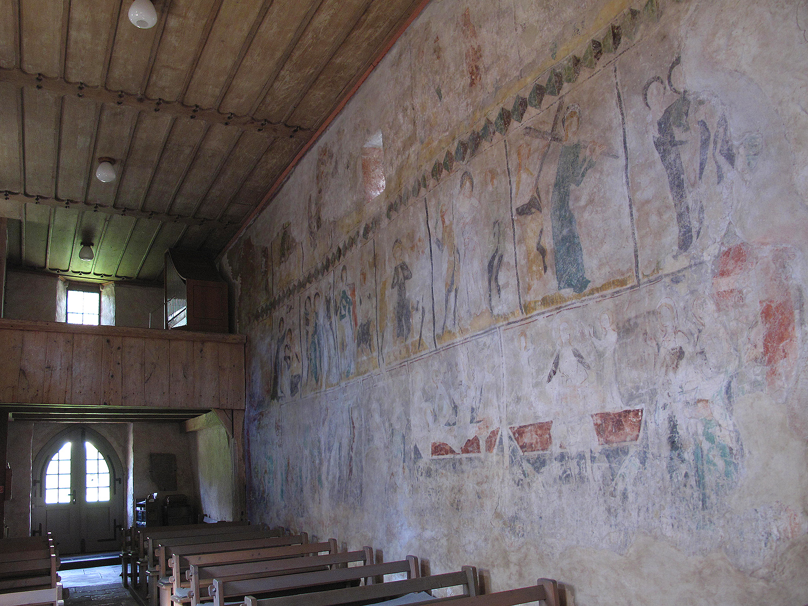 St. Candiduskirche Kentheim, Baden-Württemberg, Bad Teinach-Zavelstein – Kirchenschiff Nordwand, von Ost nach West